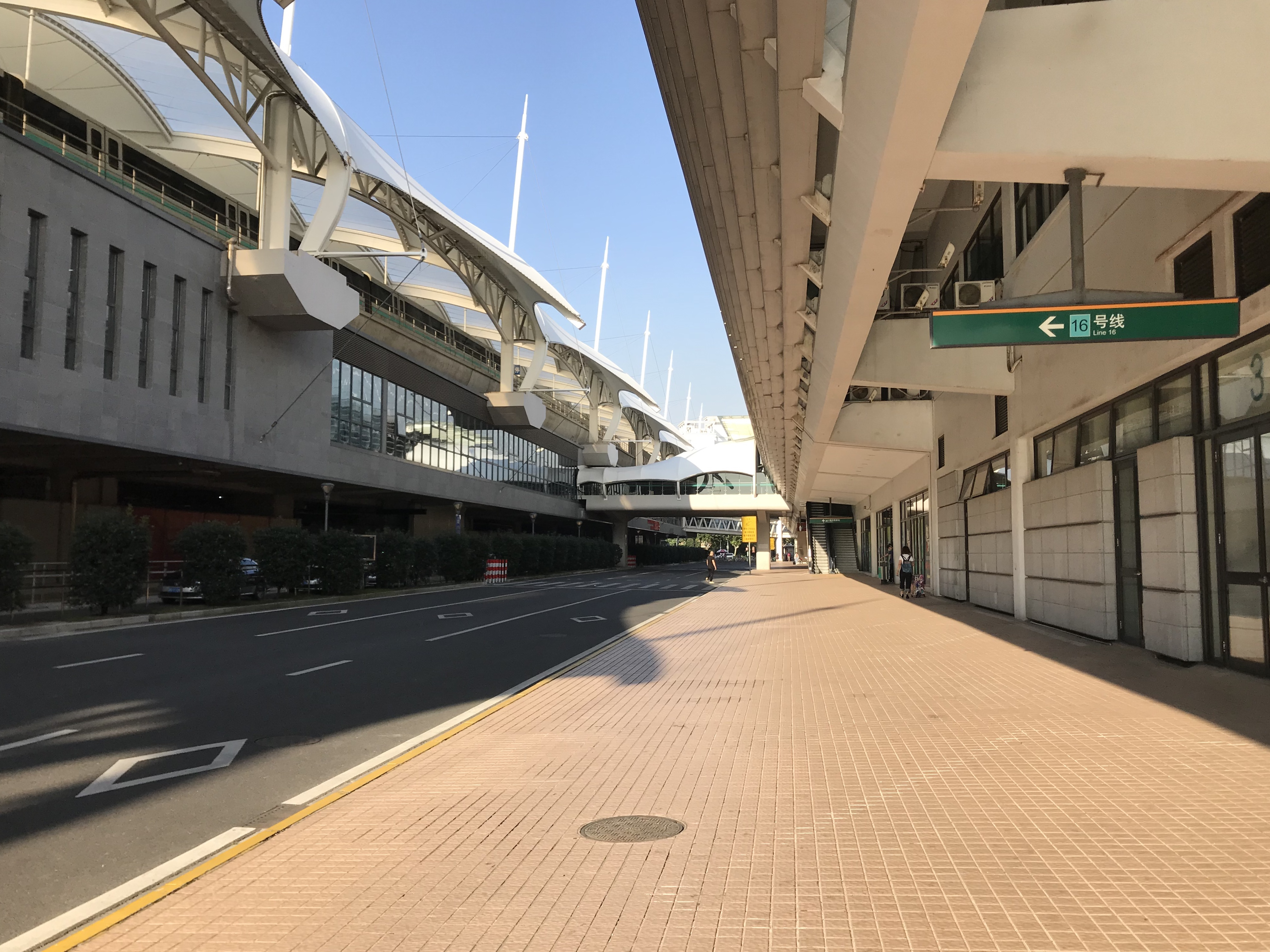 龍陽路駅の駅舎。左側は上海地下鉄16号線、右側は上海トランスラピッド